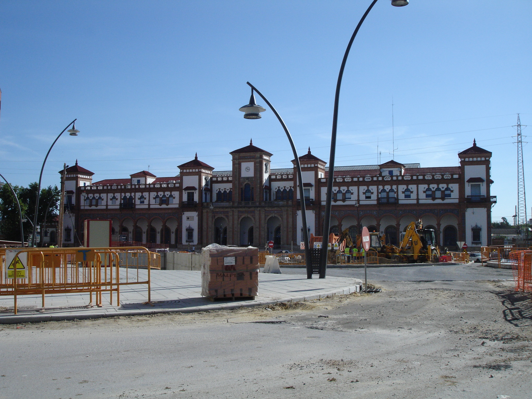 Estación trenes Jerez (Spain)